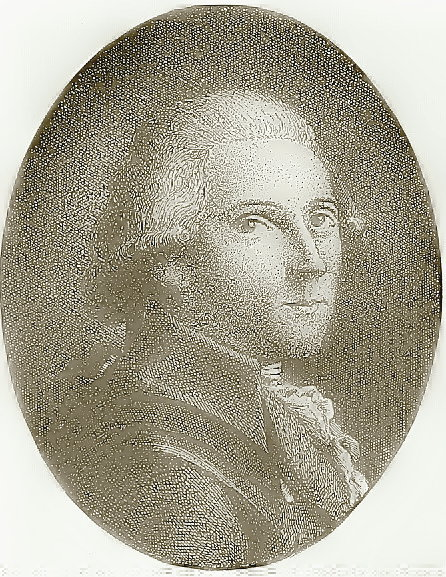 Portrait